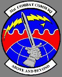 31st_Combat_Communications_Squadron